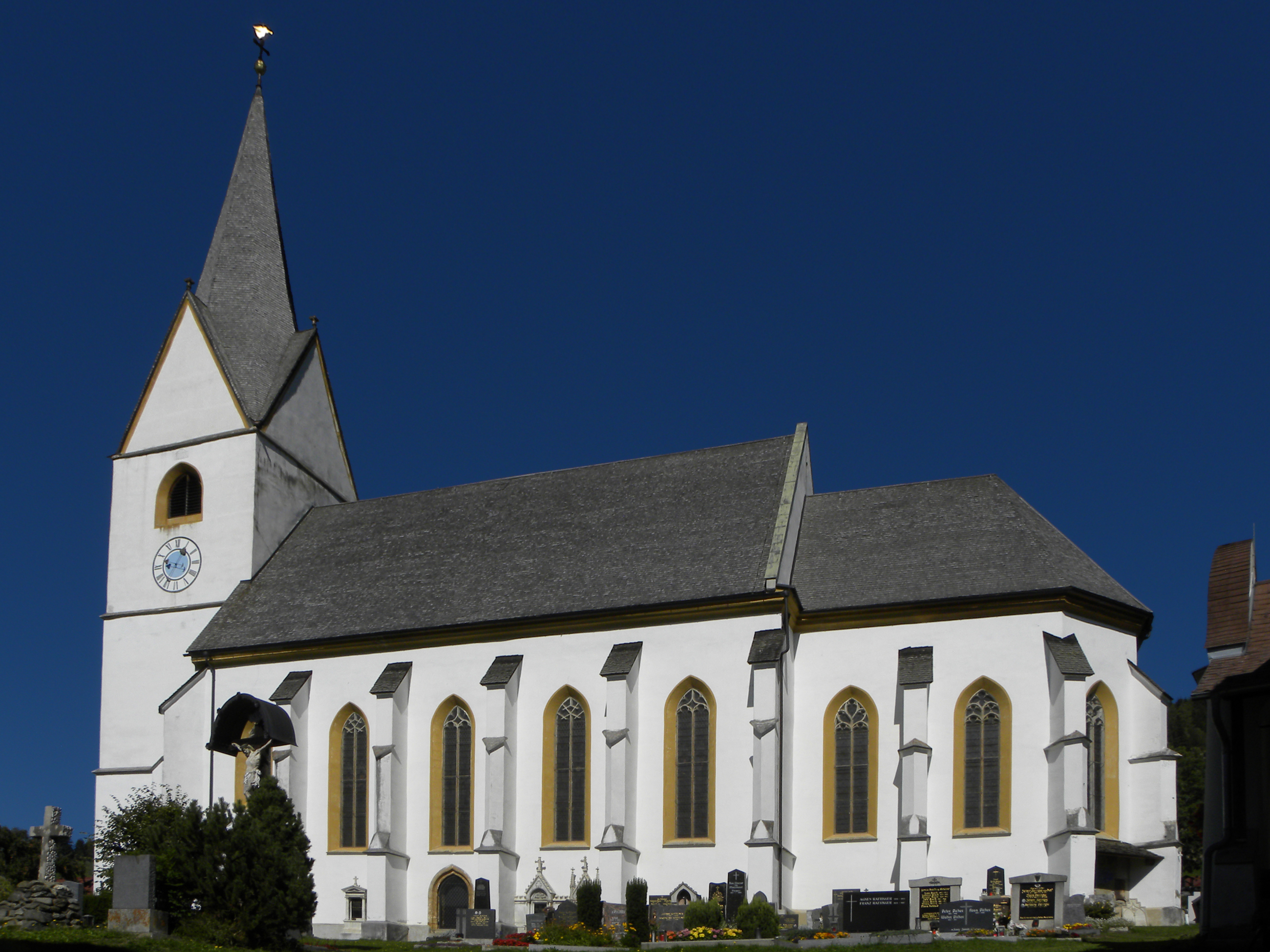 Kath. Pfarrkirche hl. Oswald und Friedhof